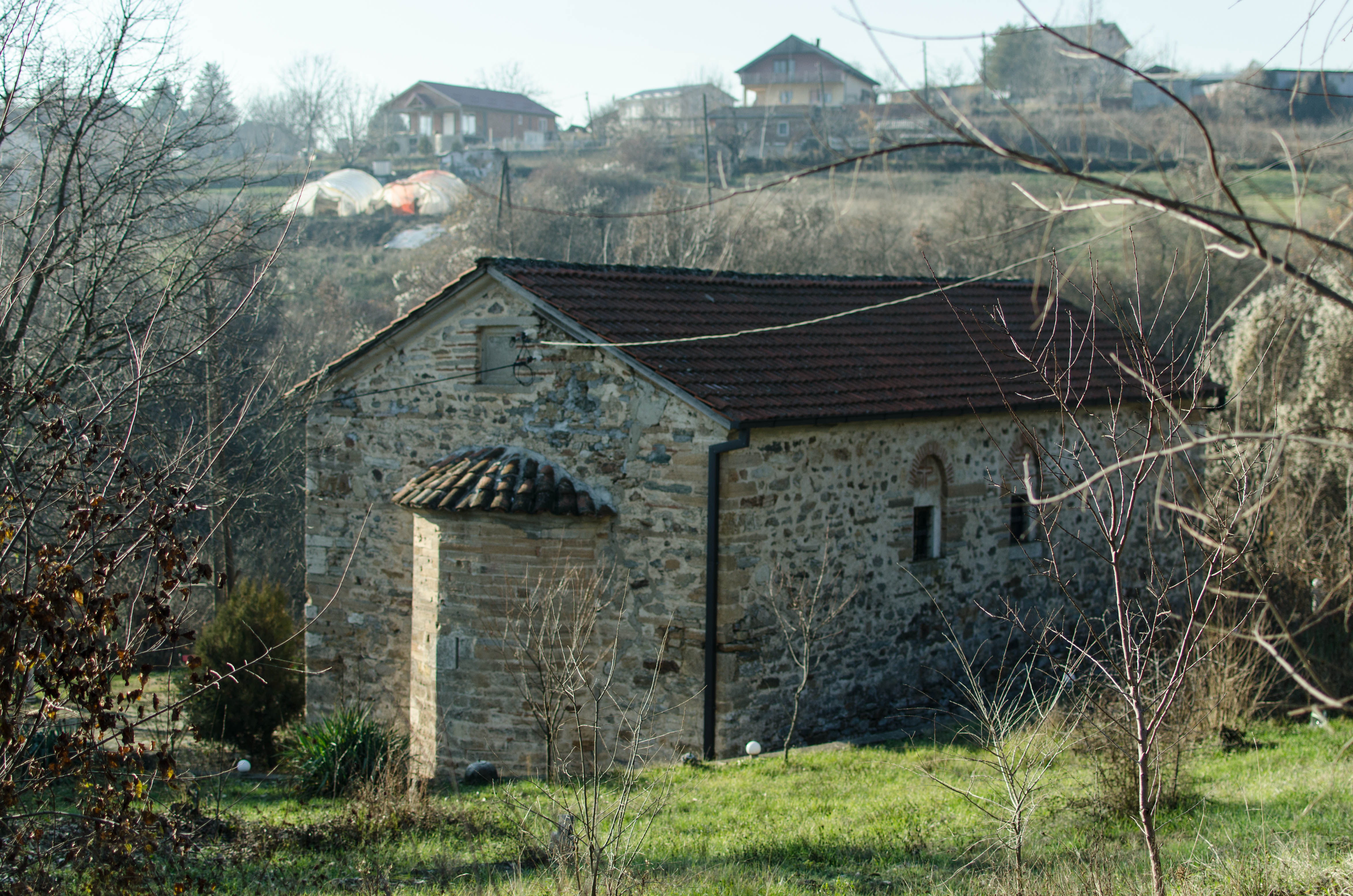 Црквата „Св. Спас“ во с. Црешево фотографирана од главниот пат.